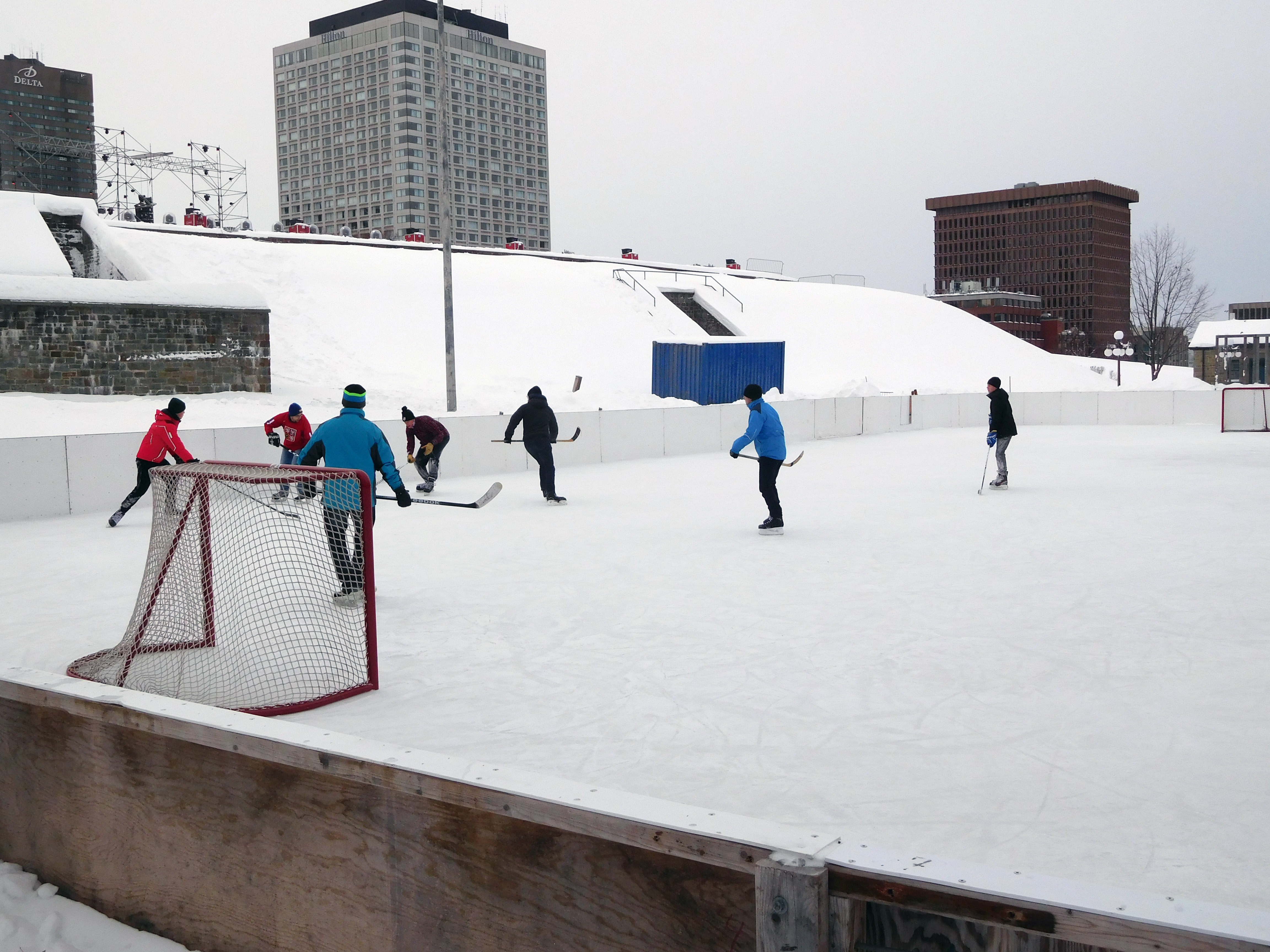 Hockey sur glace, patinoire du parc de l'esplanade Le parc de l'Esplanade, à Québec, est situé au nord de la rue Saint-Louis, à l'ouest de la rue D'Auteuil, au sud de la rue Dauphine.